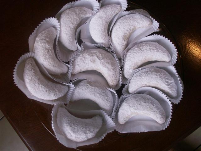 Tcharak (Cornes de gazelles algériennes)